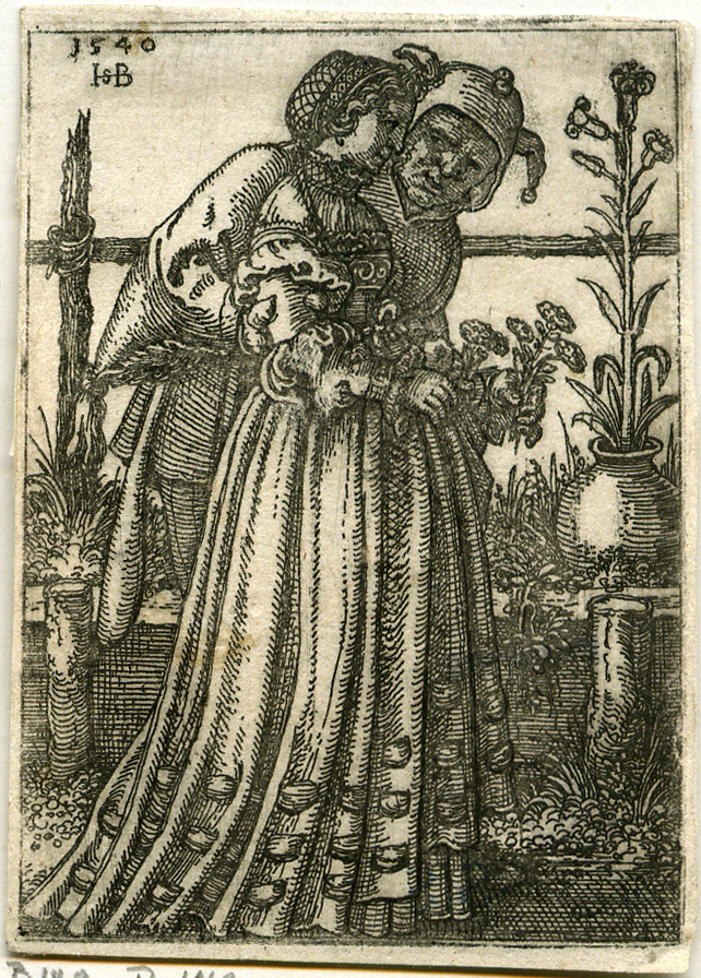 Beham, (Hans) Sebald (1500-1550): Die Dame und der Narr/The Lady and the Fool. Eisenradierung/etching. 7,3 x 5,2 cm. 1540. B. 148, Pauli 149, Hollstein 149. Eine der seltenen Eisenradierungen aus dem druckgraphischen Oeuvre des Hans Sebald Beham in einem ganz ausgezeichneten, gleichmäßig klaren Druck mit winzigem Rändchen. Verso Restchen alter Montage, winzige Fehlecke unten rechts, sonst in sehr guter Erhaltung. See also 'The Lady and Death', 1541 (Bartsch 149), based on this etching.